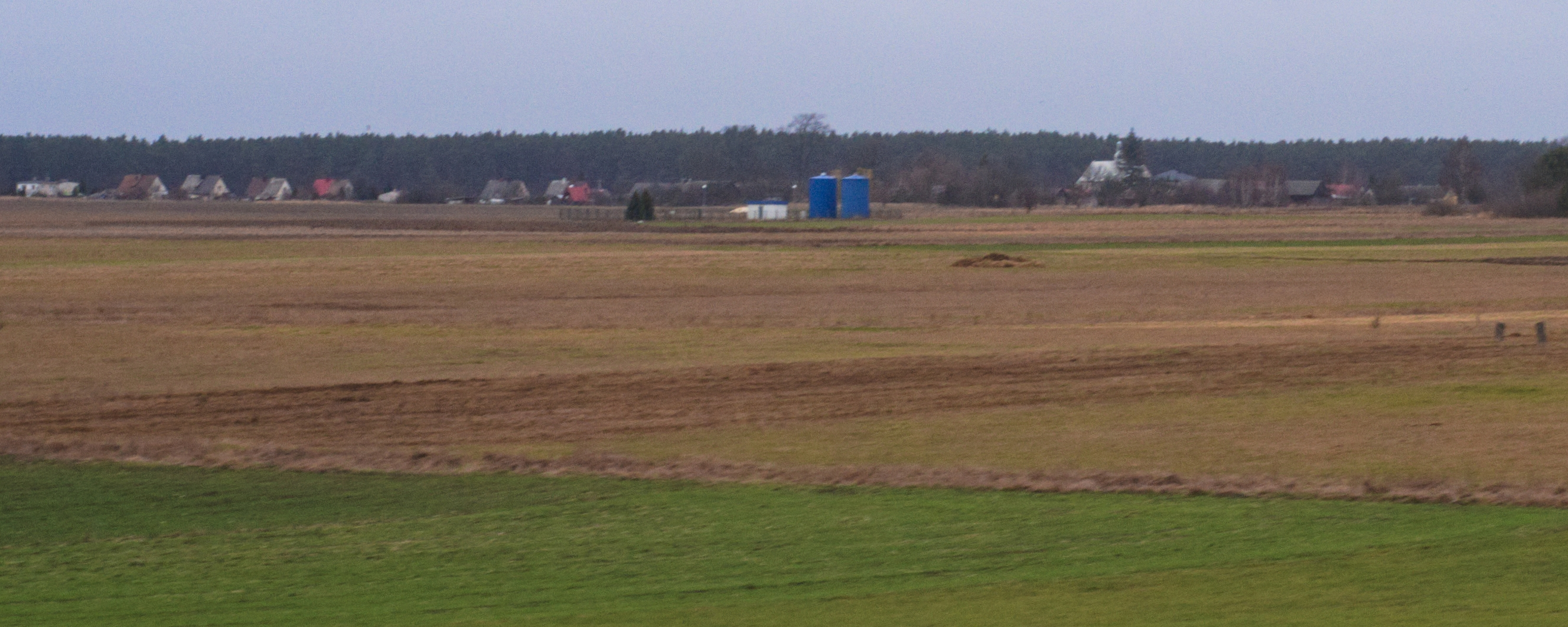 Kuczków, gmina Secemin; widoczny kościół Podwyższenia Krzyża Świętego w Kuczkowie; widok z pociągu PKP Intercity Morcinek, jadącego do Lublina